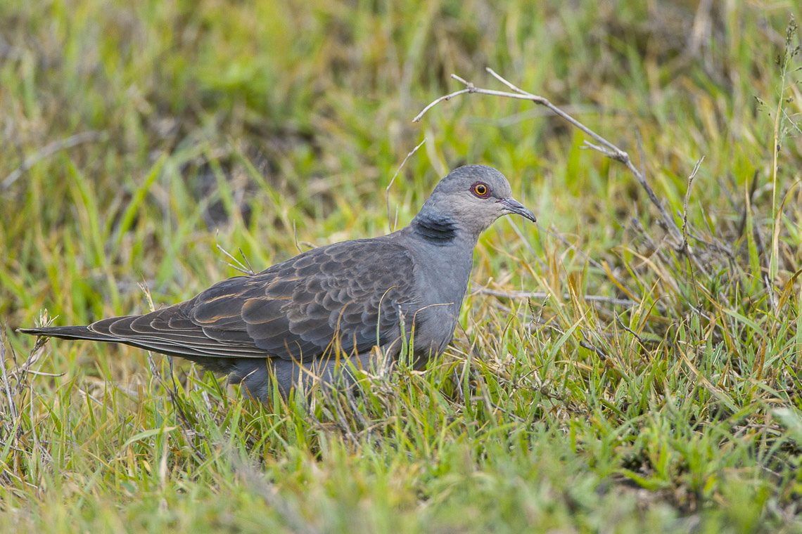 Dusky Turtle-Dove - Tanzania 2008-03-01_0094